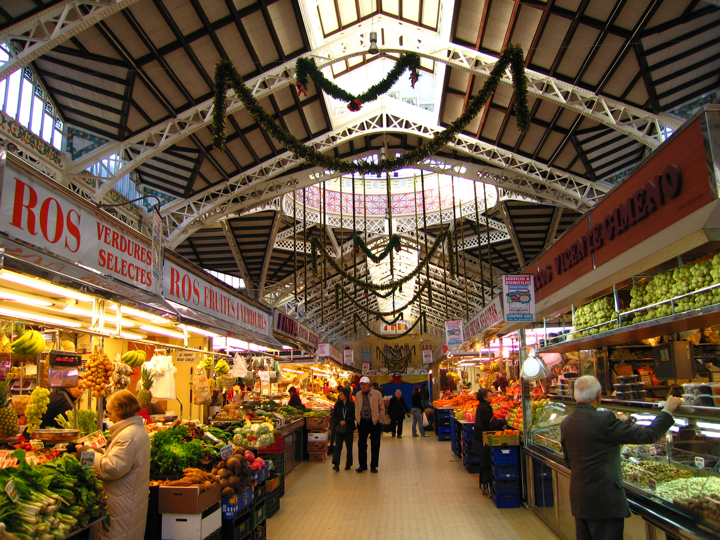 Interior del Mercat Central de valència